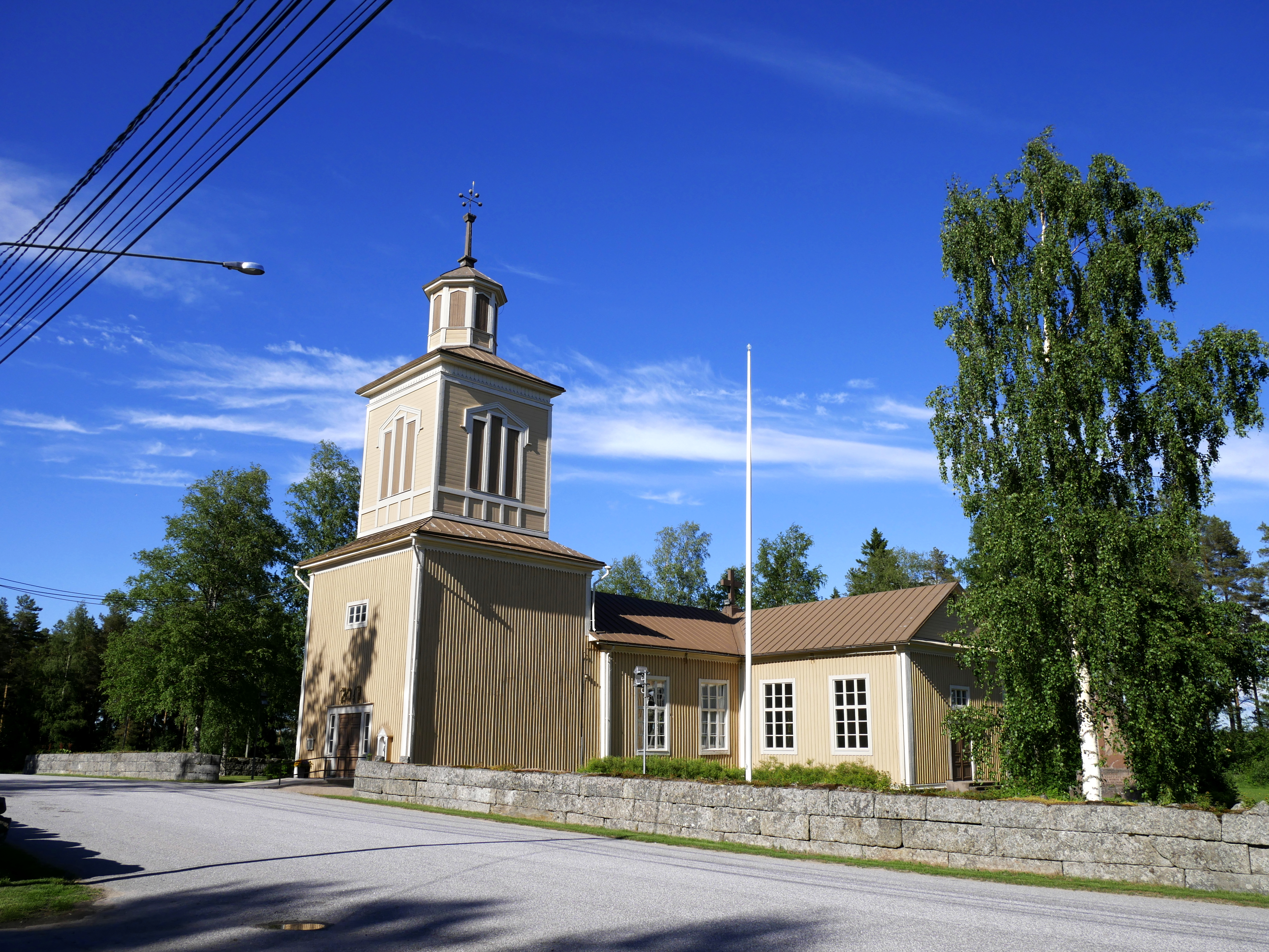 Jepuan kirkko.